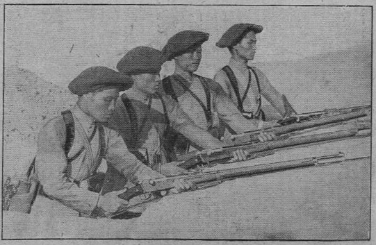 illustration du magazine.